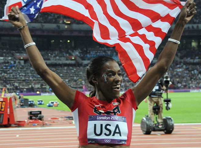 DeeDee Trotter après le succès du relais américain dans le 4x400 aux jeux olympiques de Londres 2012